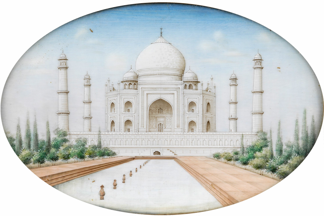 Taj Mahal. Miniatur, Indien 19. Jahrhundert. Gouache auf Elfenbein. Ca. 13 x 8,5 cm